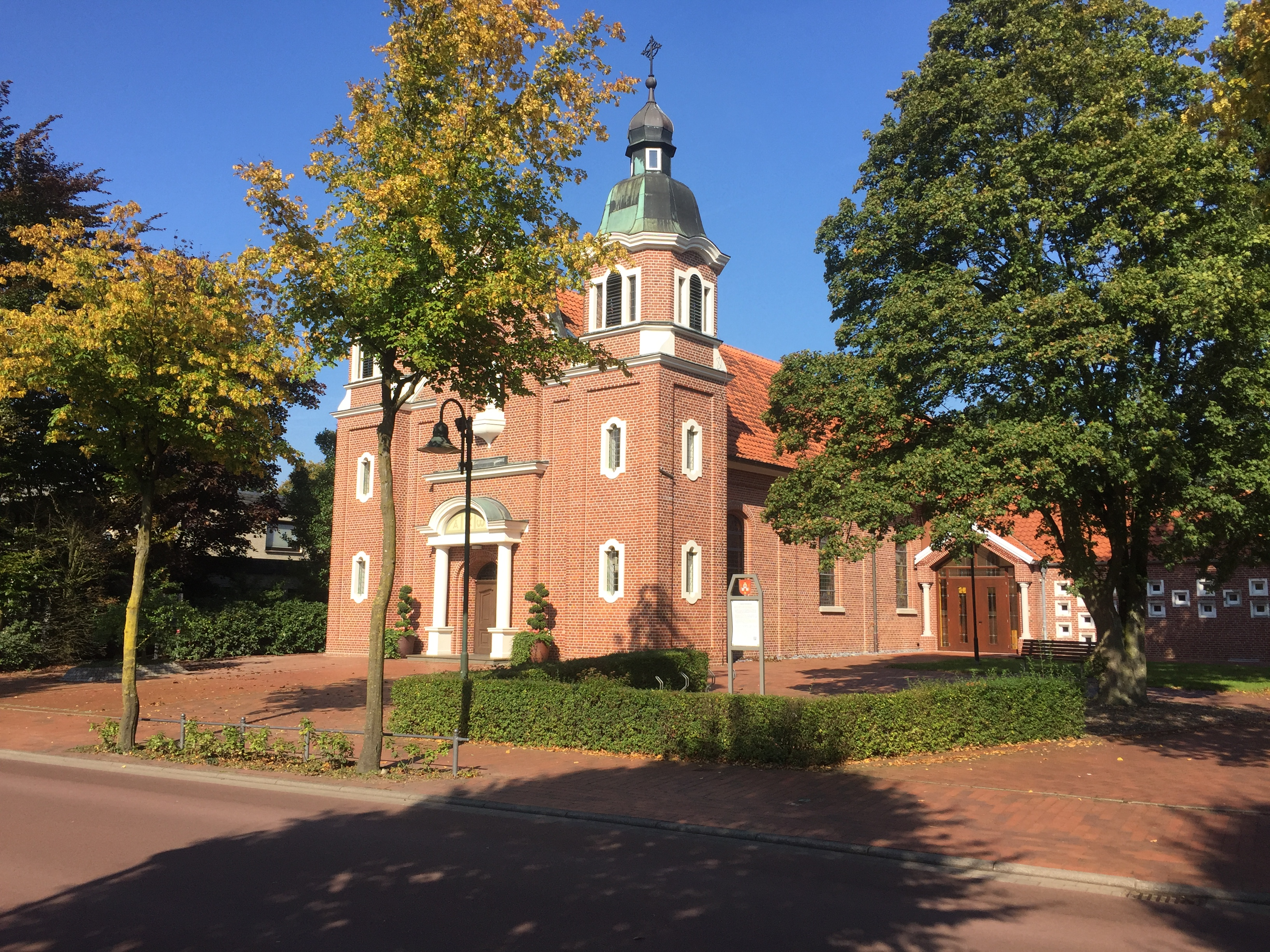 Kath. Kirche St. Aloysius Höltinghausen